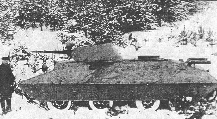 Опытный образец танка БТ-СВ-2 во время испытаний.